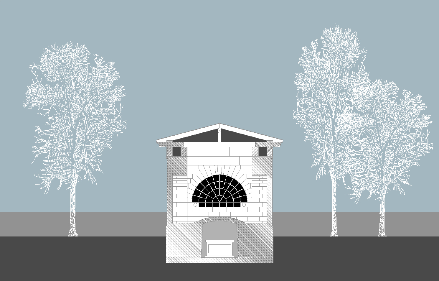 Mausoleum der Familie von Hoym, Schnitt B. © Eiko Behrens